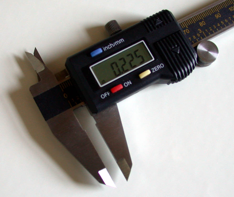 Digital calipers.